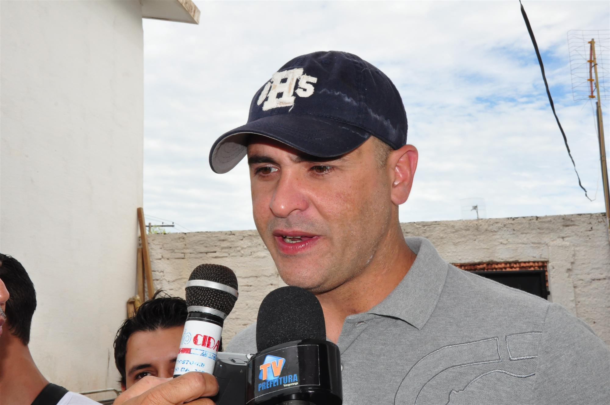 Foto: André Luiz D. Takahashi